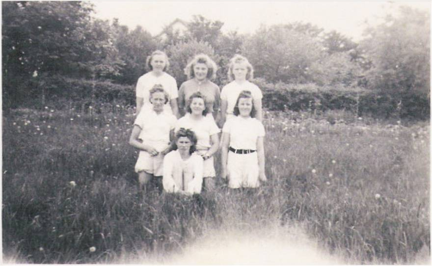 ØB Damehåndbold